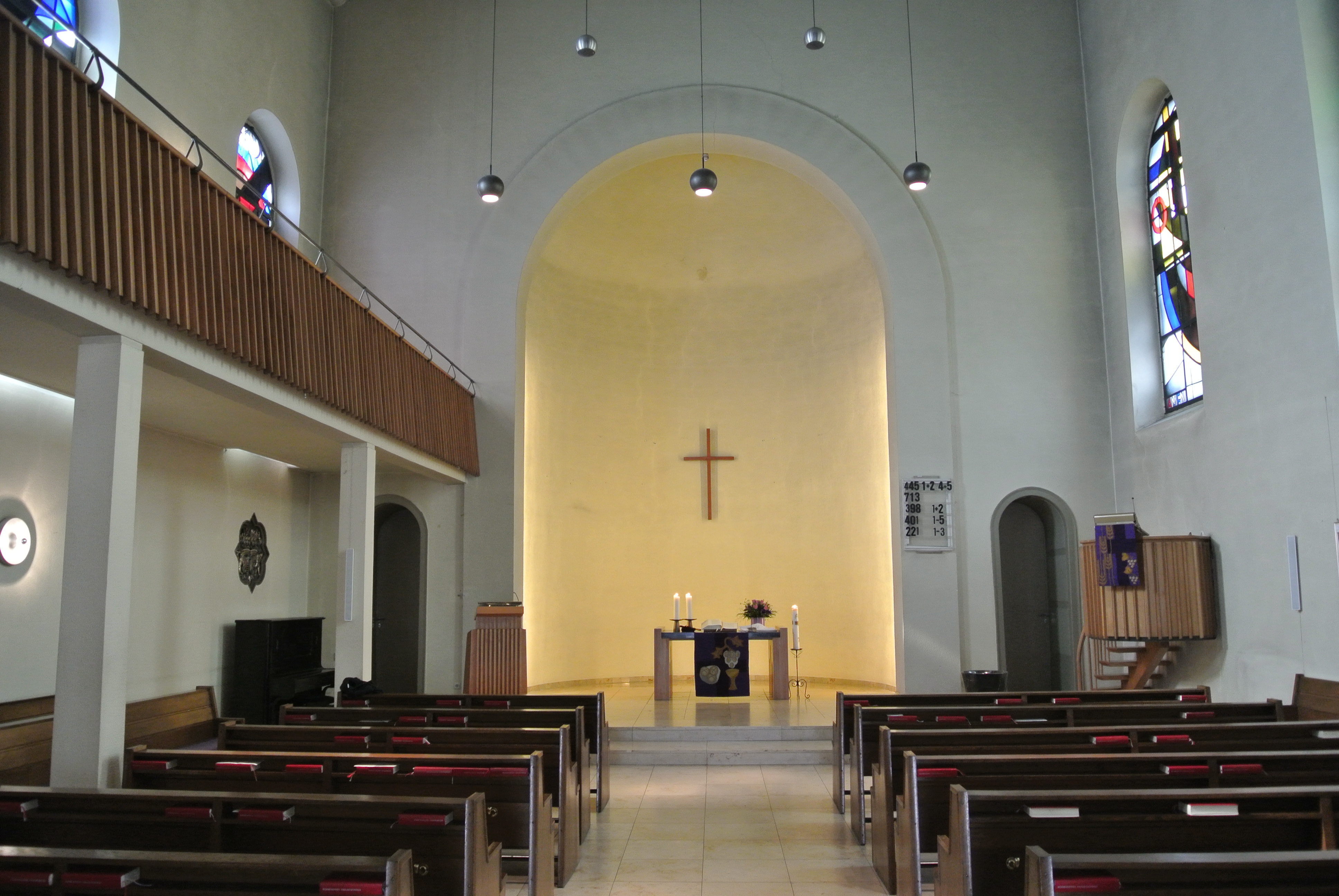 Evangelische Segenskirche in Frankfurt-Griesheim, Alte Falterstraße 6, neoromanische Hallenkirche von Heinrich Burnitz, 1865, Baudenkmal, Innenraum mit Altar